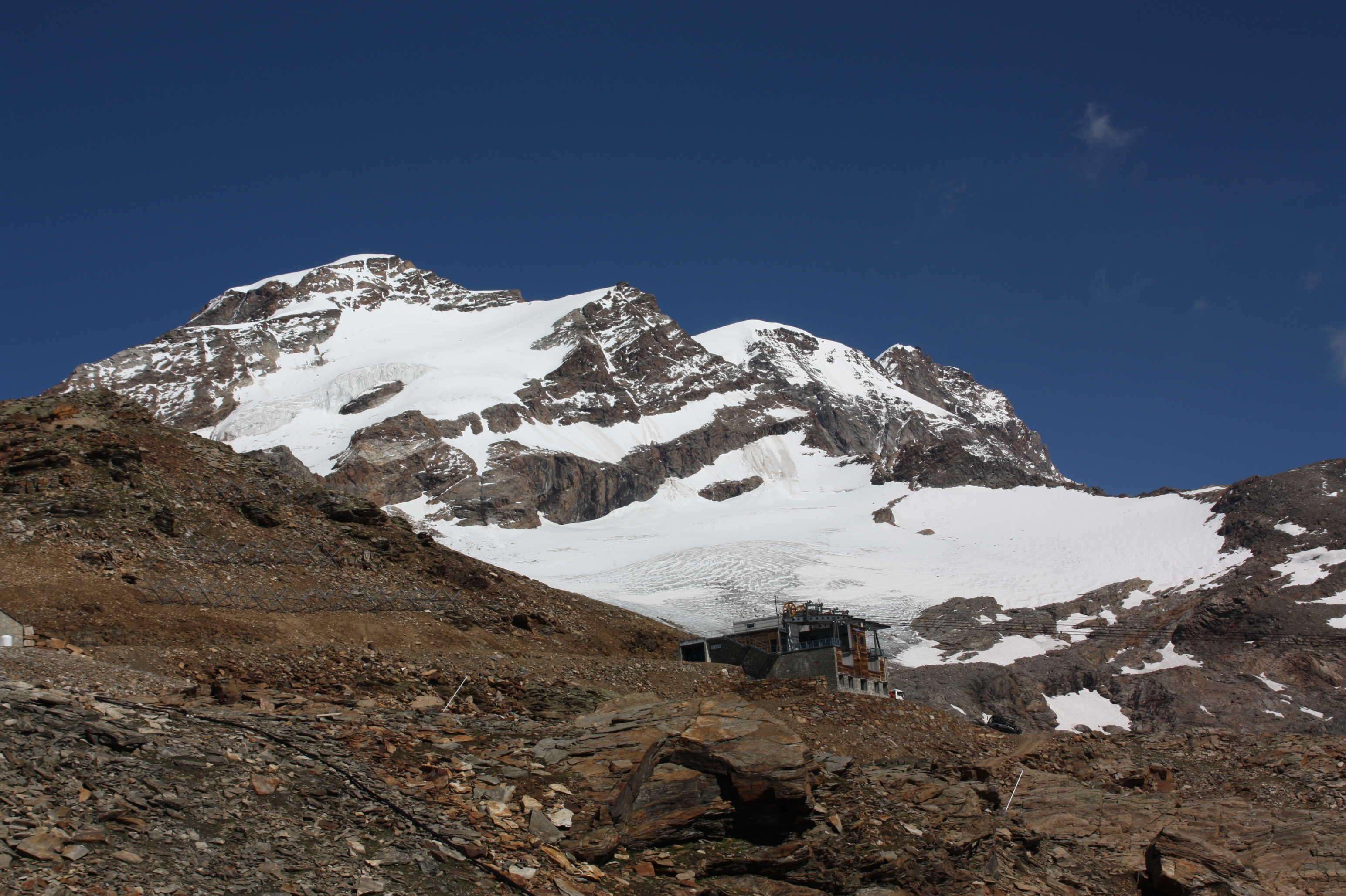 Vista da nuova stazione funivia Punta Indren